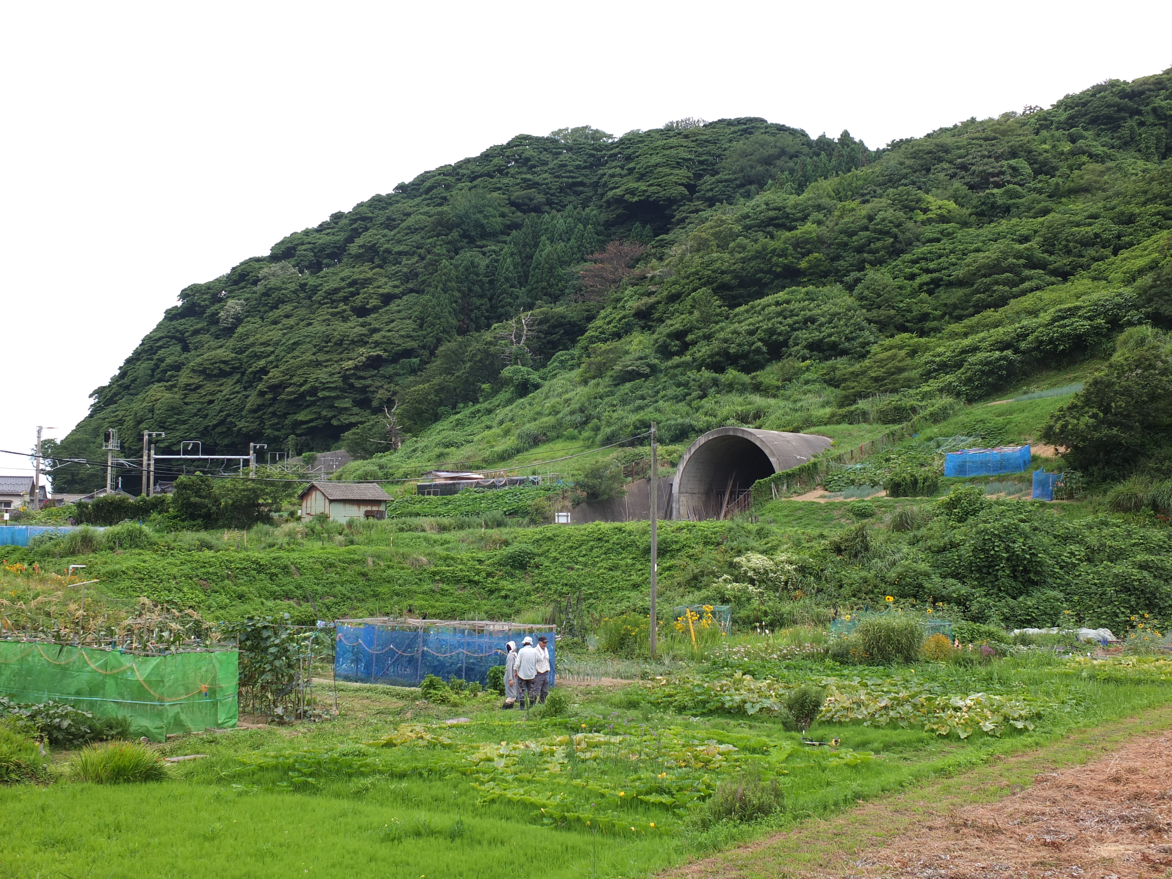 羽越本線 小岩川駅-あつみ温泉駅間の新線予定地で竣工・放置されている住吉山トンネル（小岩川方坑口）